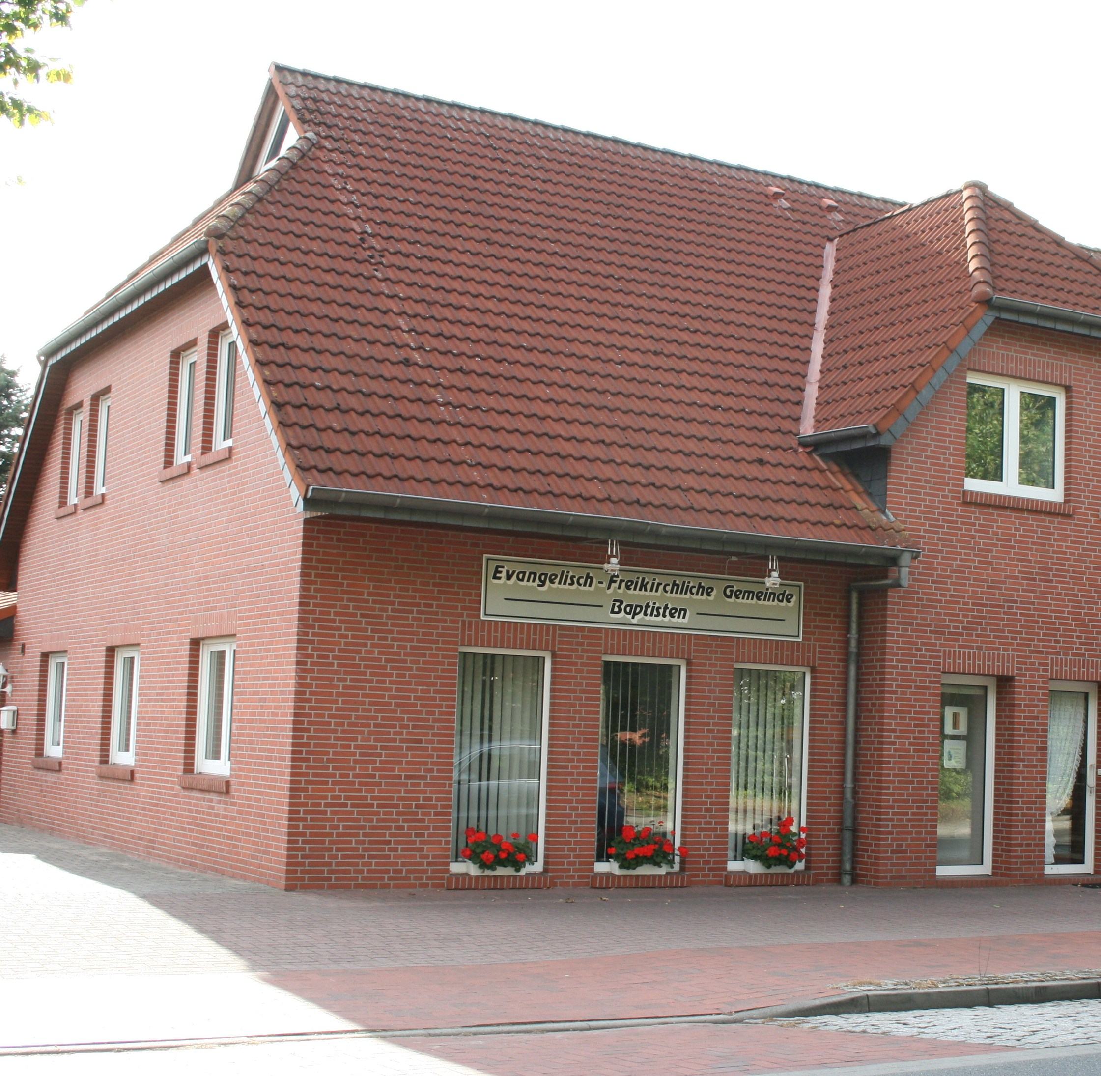 Ladenkirche der Baptistengemeinde Sedelsberg